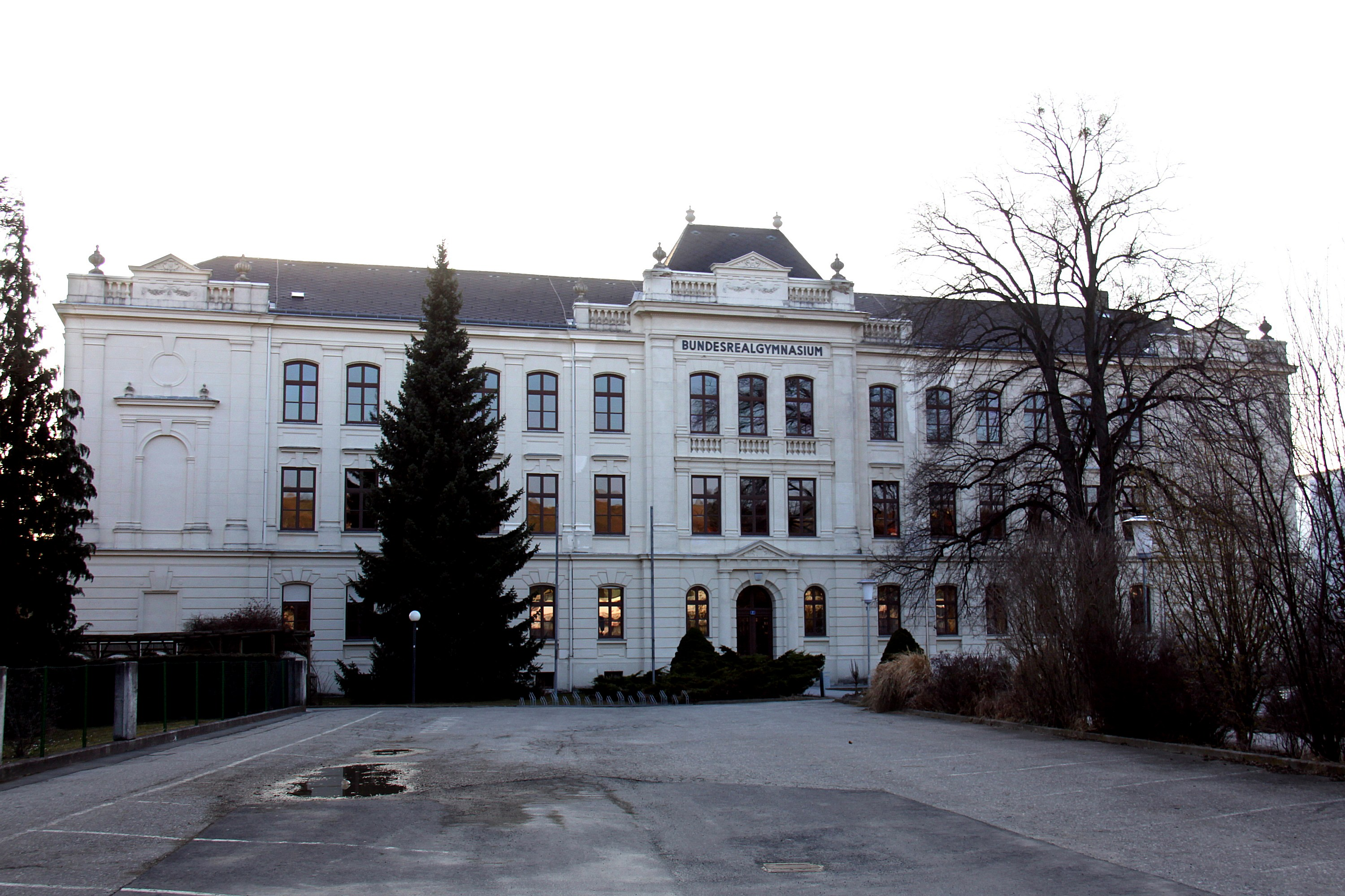 Denkmalgeschütztes Bundesrealgymnasium in Oberschützen. Object location47° 21′ 07.69″ N, 16° 12′ 23.71″ E